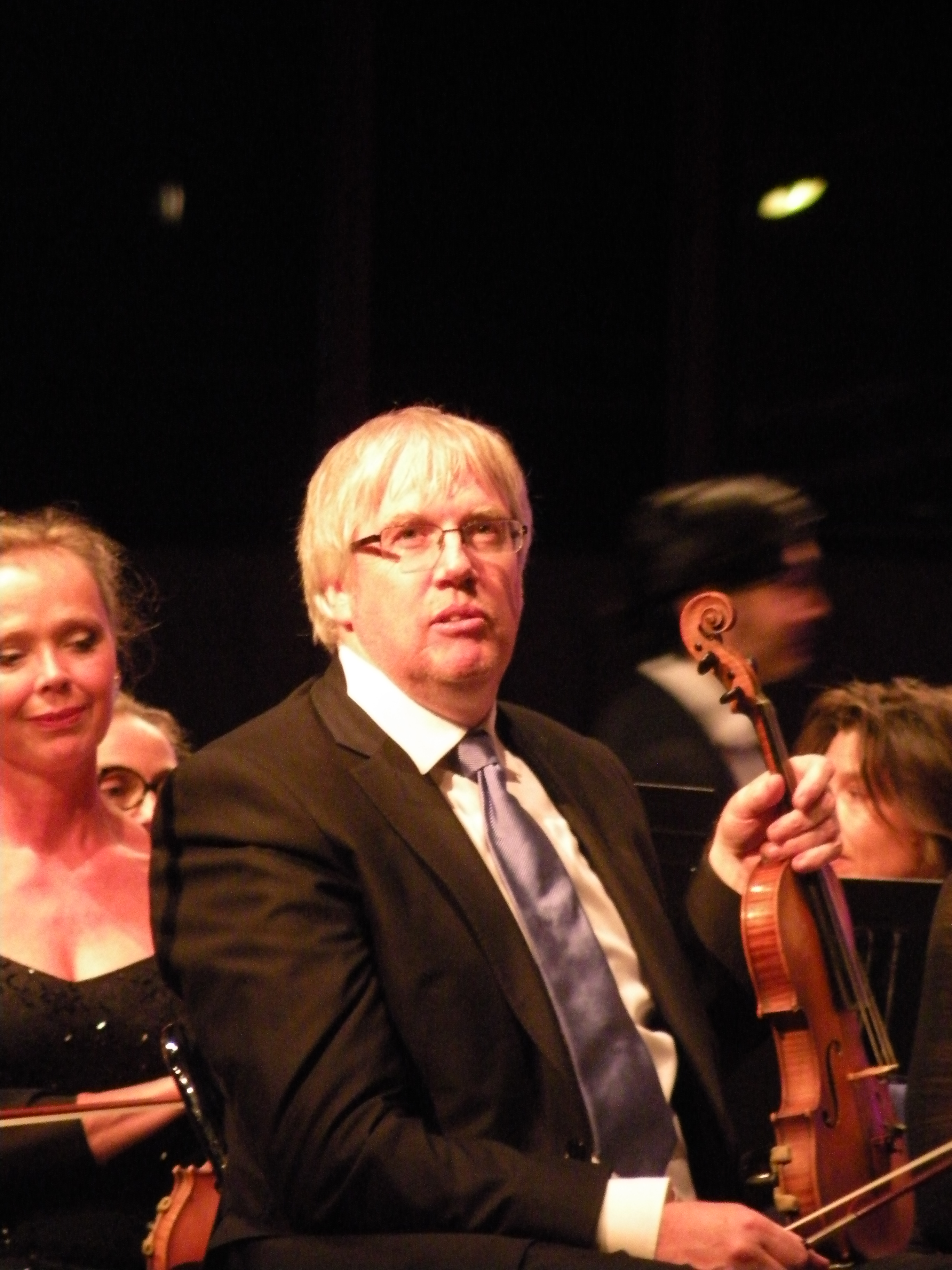 Soirée d'ouverture des Concerts d'été au Triangle à Rennes : le premier violon de l'Orchestre symphonique de Bretagne.